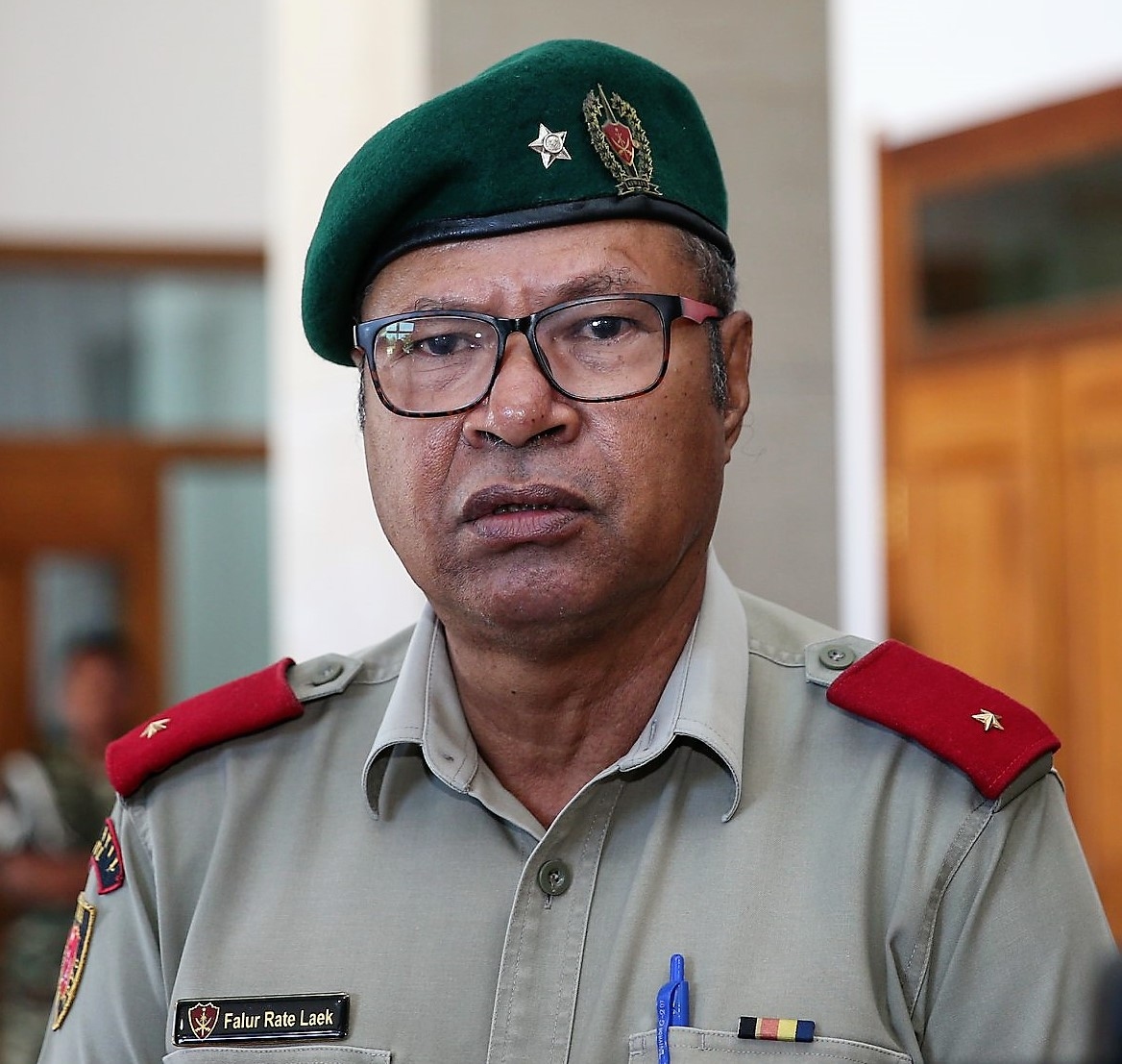 Brigadegeneral Falur Rate Laek